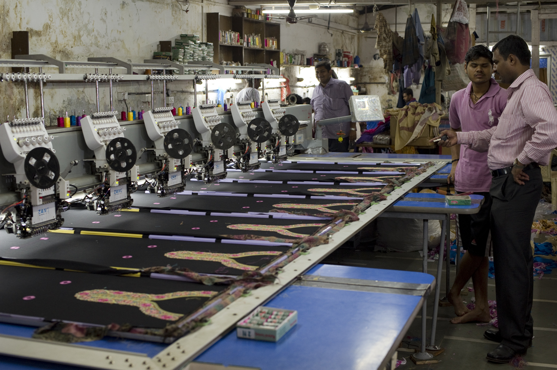 Dharavi, das grösste Slum von Mumbai beherbergt ca eine halbe Million Menschen auf 2 km². Hinter den Fassaden der einfachen Behausungen wird vorallem gearbeitet. Das Gewerbe in Dharavi ist nach Berufsgilden unterteilt. So findet man zum Beispiel in einem Gebiet vorallem Nähereien oder Gerbereien oder Töpfereien und so weiter. Die Arbeitsstätten sind sehr unterschiedlich ausgestattet. Manchmal mit sehr alten Nähmaschinen oder dann mit modernen Anlagen wie auf diesem Bild. Eine Anlage wie auf dem Bild kostet um die 30'000 Dollar. Einerseits überrascht es, in einem Slum solche Anlagen vorzufinden, andererseits stellt man die Anlagen natürlich wegen den billigen Arbeitskräften dort hin.